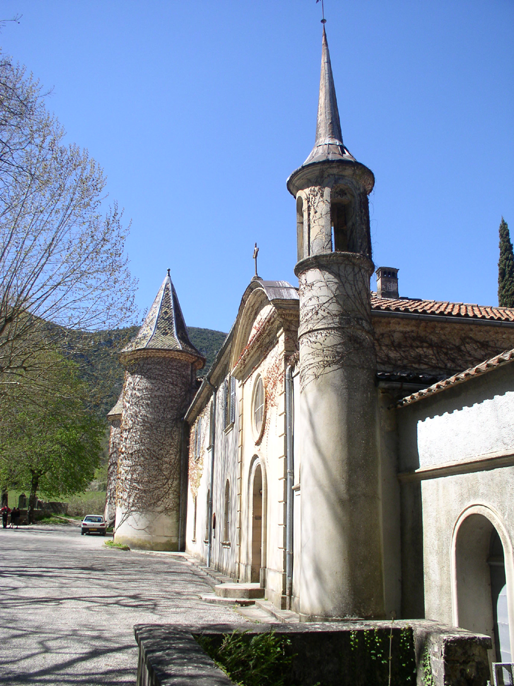 Chartreuse de Montrieux, située à Méounes-lès-Montrieux (Var, France). Auteurs Jodelet/Lépinay